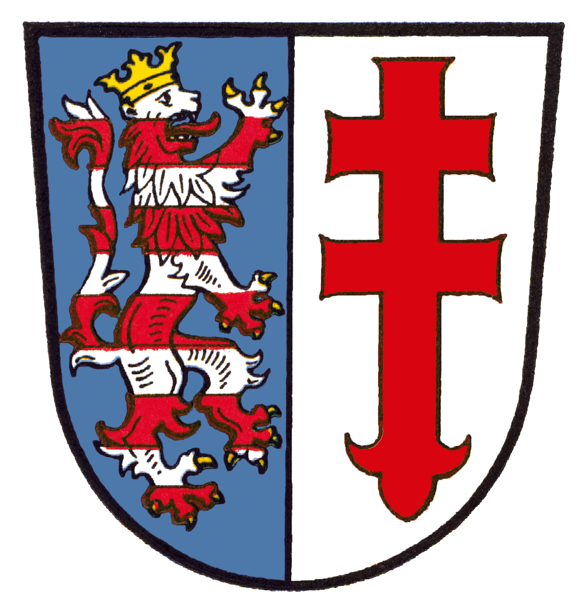 Wappen von Bad Hersfeld